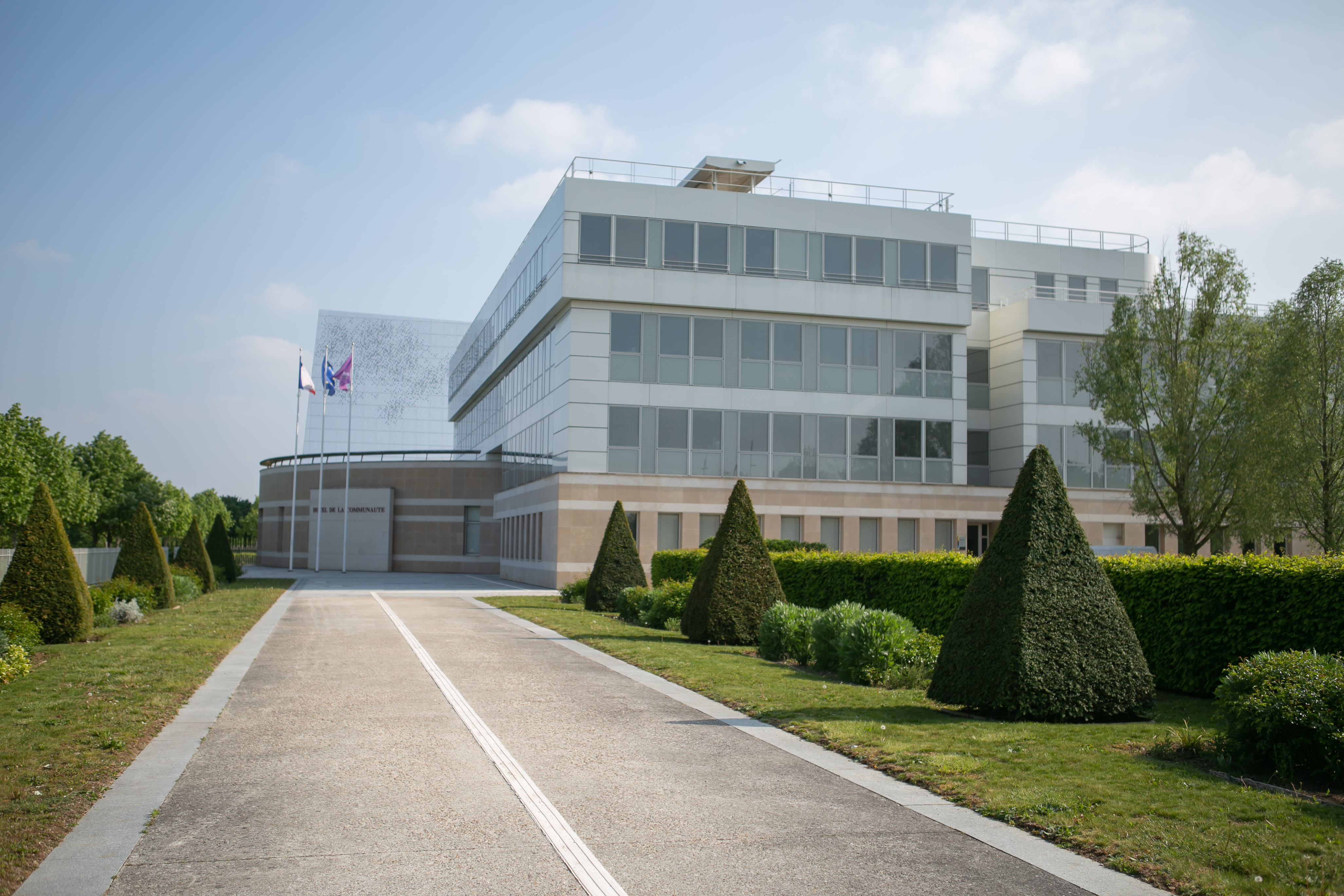 Vue de l'hôtel de la communauté de Grand Paris Sud à Carré Sénart - Lieusaint / Seine-et-Marne / France